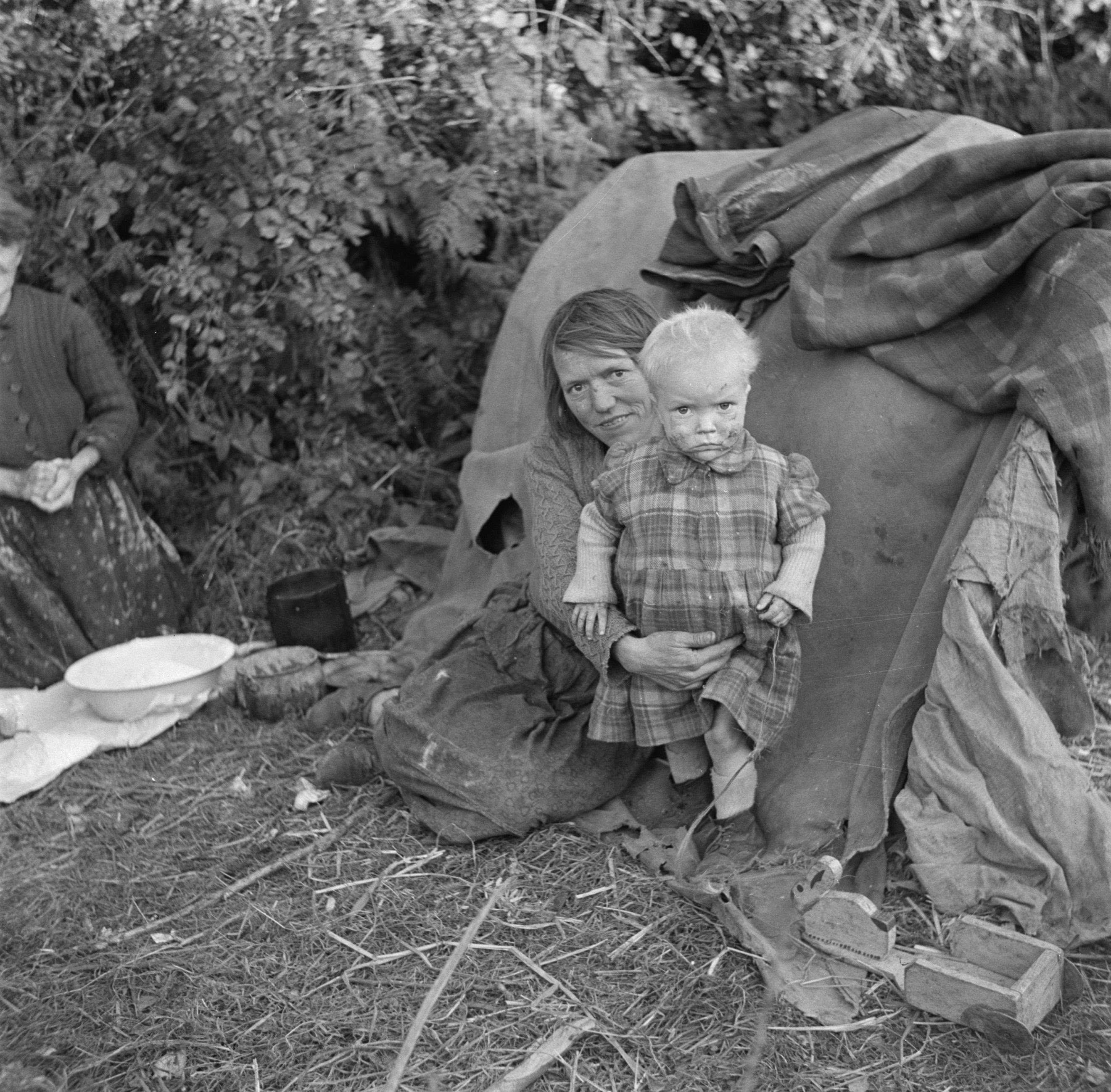 Collectie / Archief : Fotocollectie Van de Poll Reportage / Serie : Tinkers in Ierland Beschrijving : Moeder en kind voor een tent Annotatie : 'Tinker' is het Engelse woord voor ketellapper Datum : 1 januari 1930 Locatie : Ierland Trefwoorden : families, zigeuners Fotograaf : Poll, Willem van de Auteursrechthebbende : Nationaal Archief Materiaalsoort : Glasnegatief Nummer archiefinventaris : bekijk toegang 2.24.14.02 Bestanddeelnummer : 191-0828